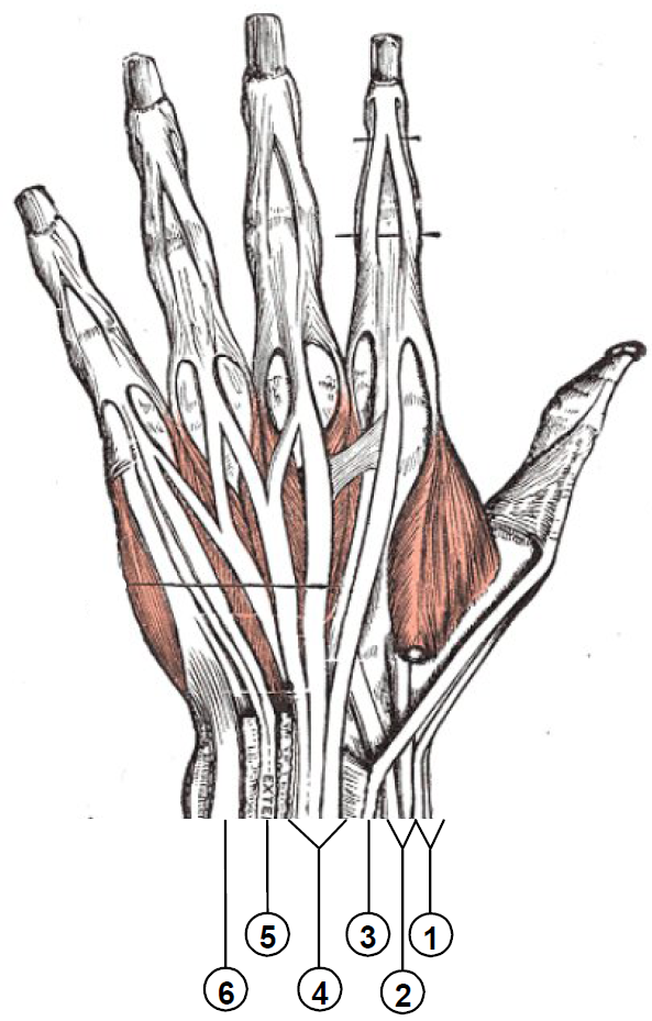 See below